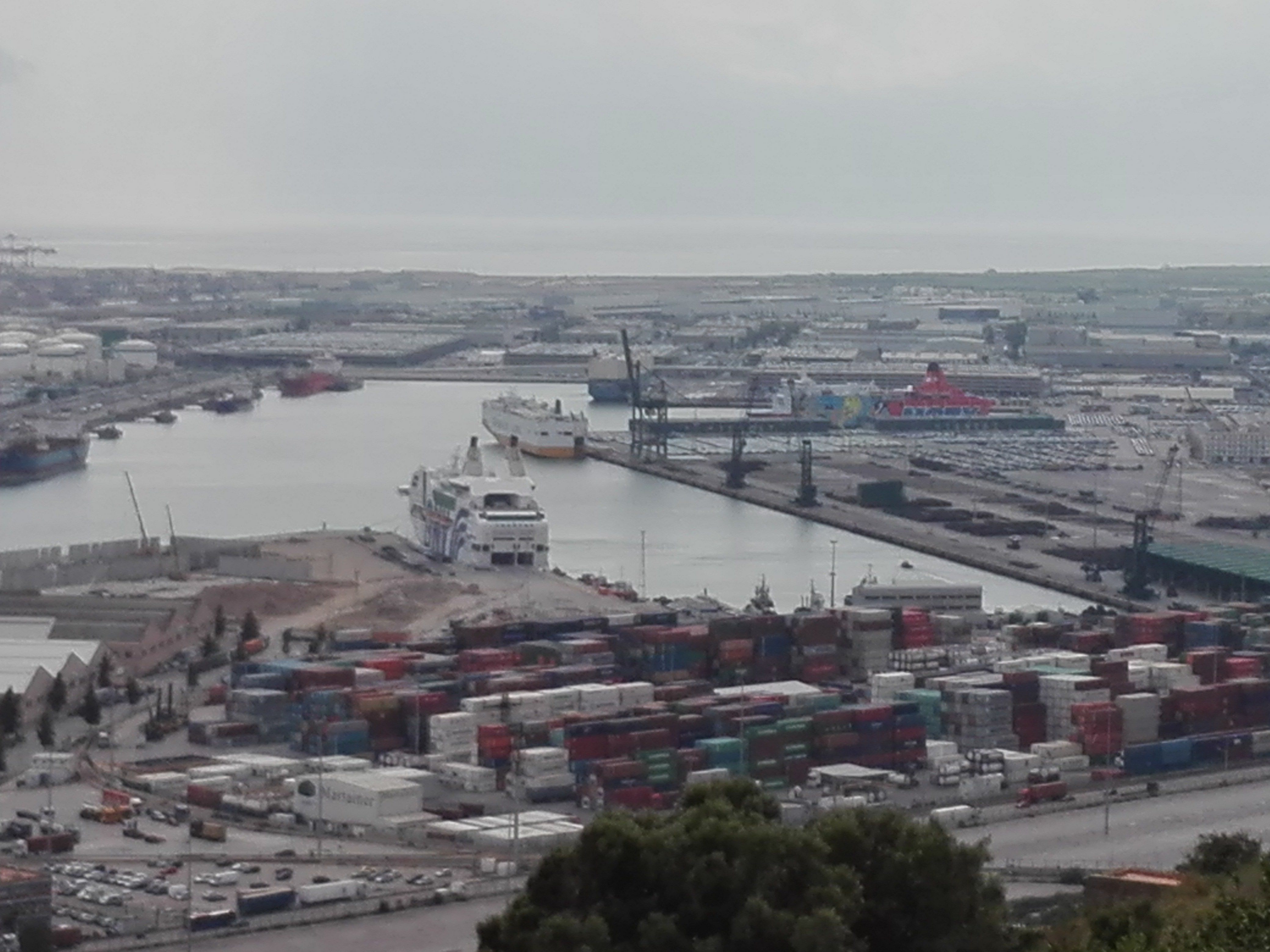 Els vaixells Moby Dada i Rhapsody que allotgen les FSE espanyoles al port de Barcelona durant les protestes de setembre de 2017